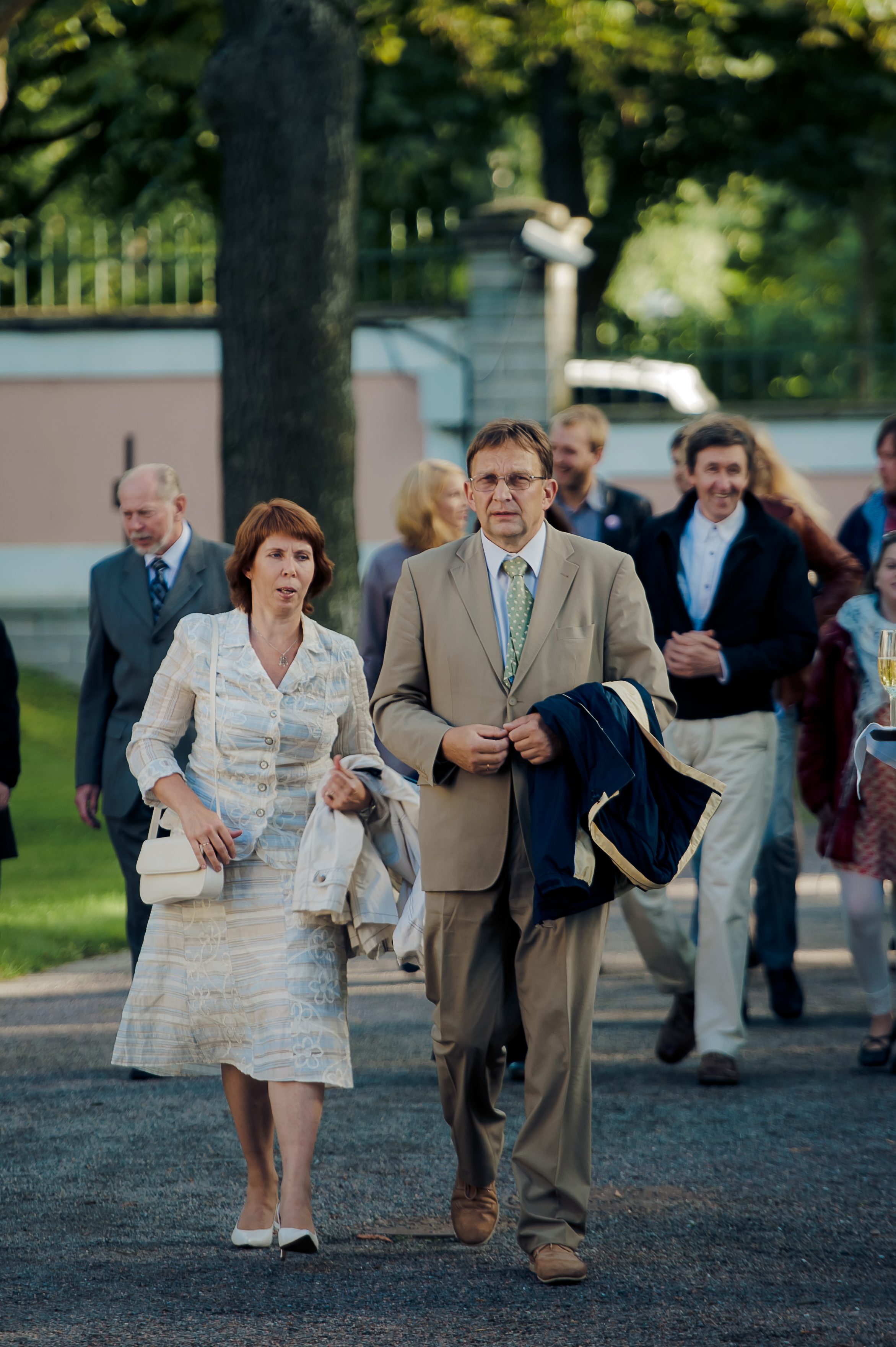 Margit Sutrop ja Urmas Sutrop Eesti riikliku iseseisvuse taastamise aastapäeva vastuvõtul augustis 2012.